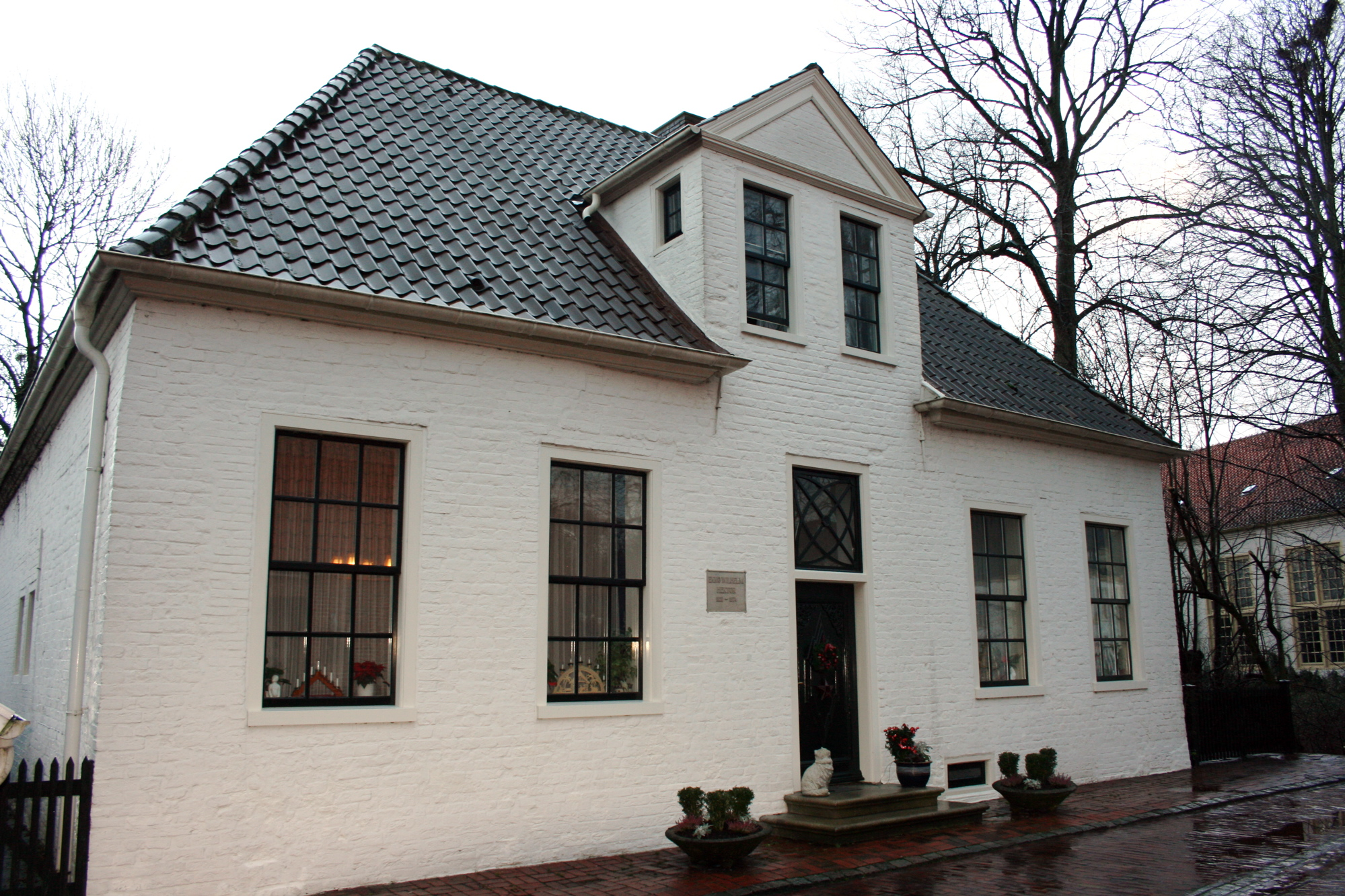 Enno Wilhelm Hektor birthplace